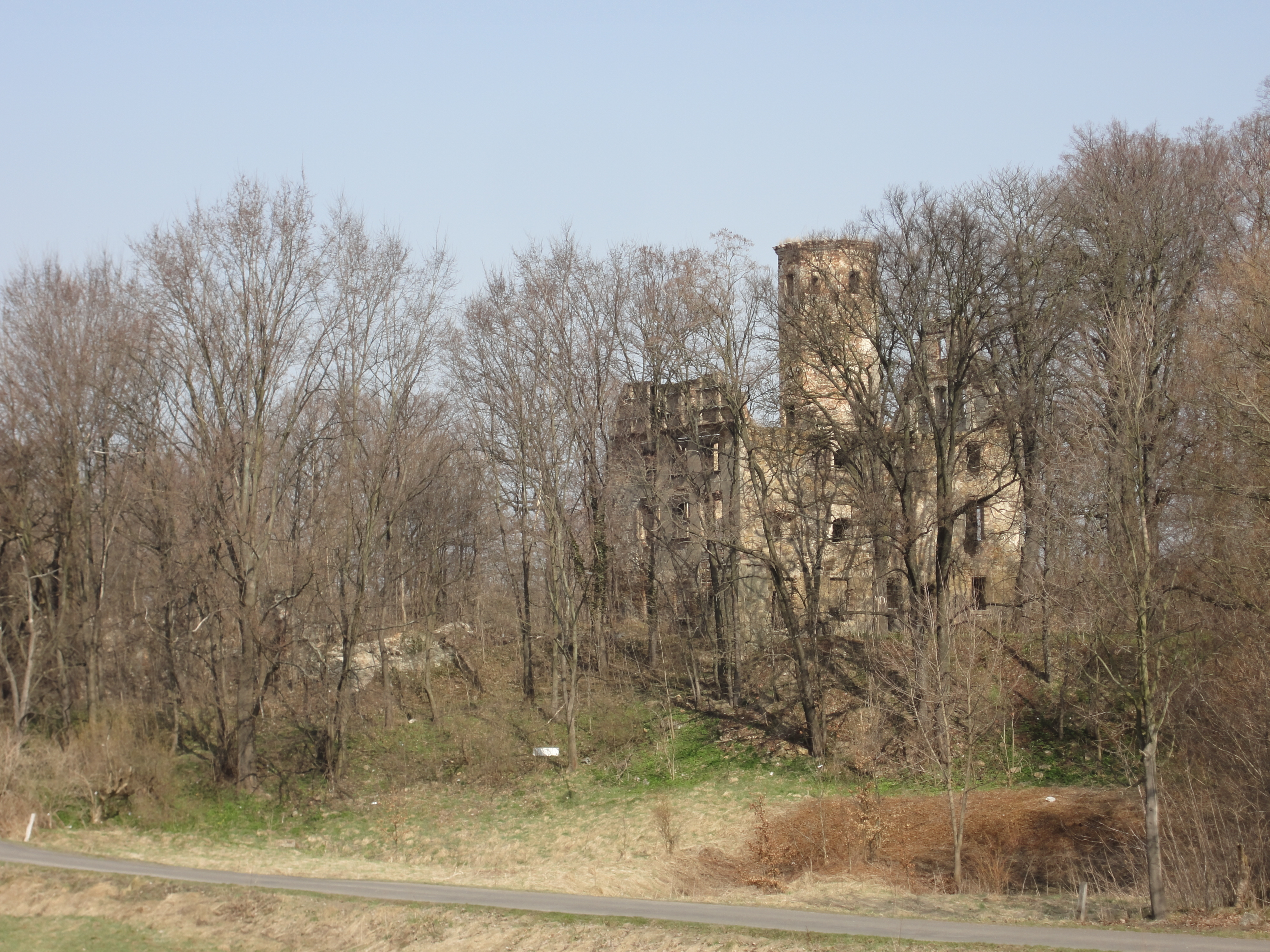 Jędrzychowice - zamek (dec. dwór), 1611-1625, XIX w.